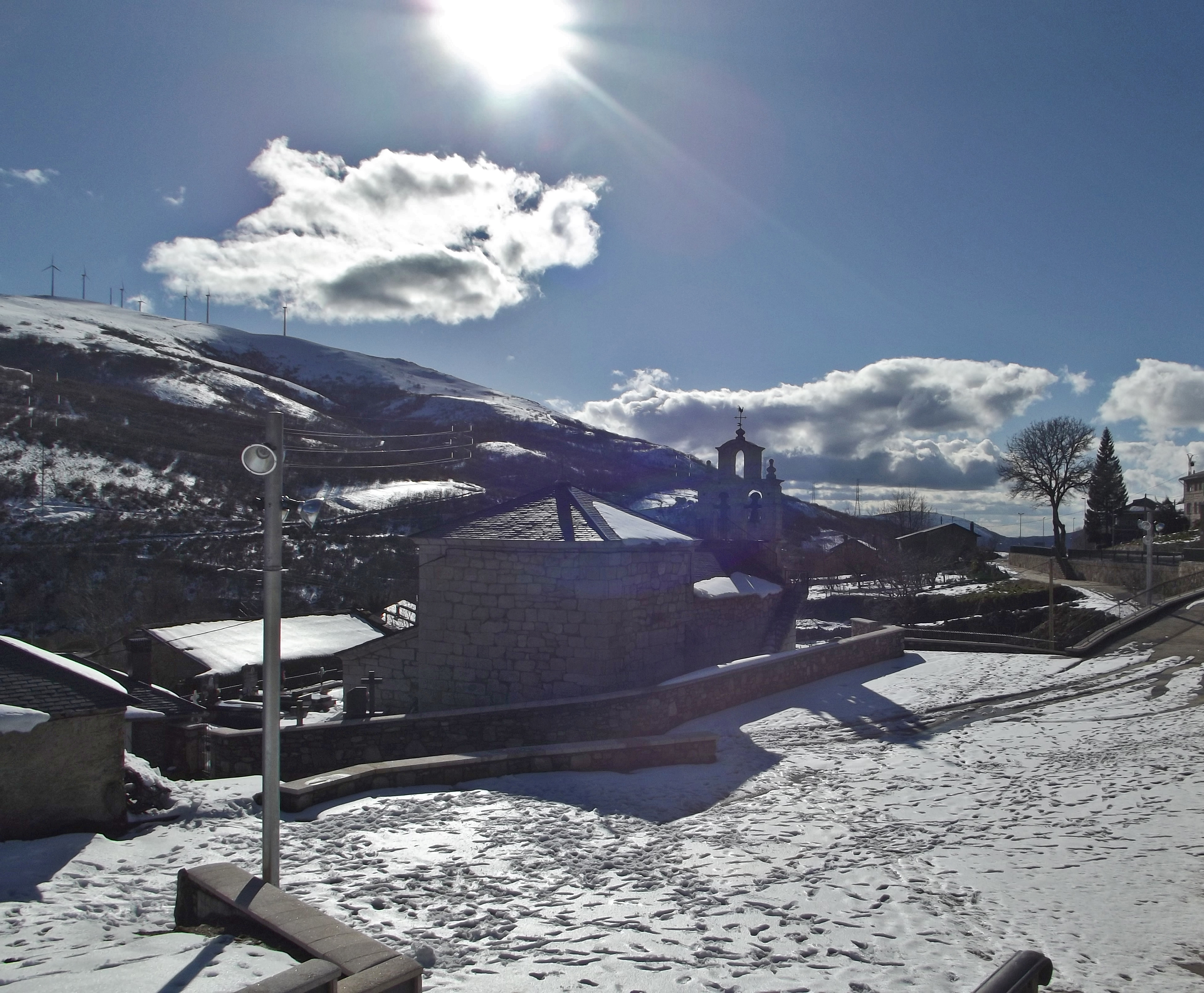 Padornelo es una localidad española del municipio de Lubián, en la provincia de Zamora (Castilla y León). Se encuentra situado en la comarca de Sanabria, y dentro de ella en la considerada Alta Sanabria. Es una de las pocas localidades bilingües de la provincia de Zamora, ya que sus habitantes utilizan habitualmente el idioma castellano y el idioma gallego. Está situado al oeste del puerto que lleva su mismo nombre (Portilla del Padornelo, situada a 1360 m), entre las montañas de la Sierra Gamoneda y la Sierra Segundera, de los Montes de León.